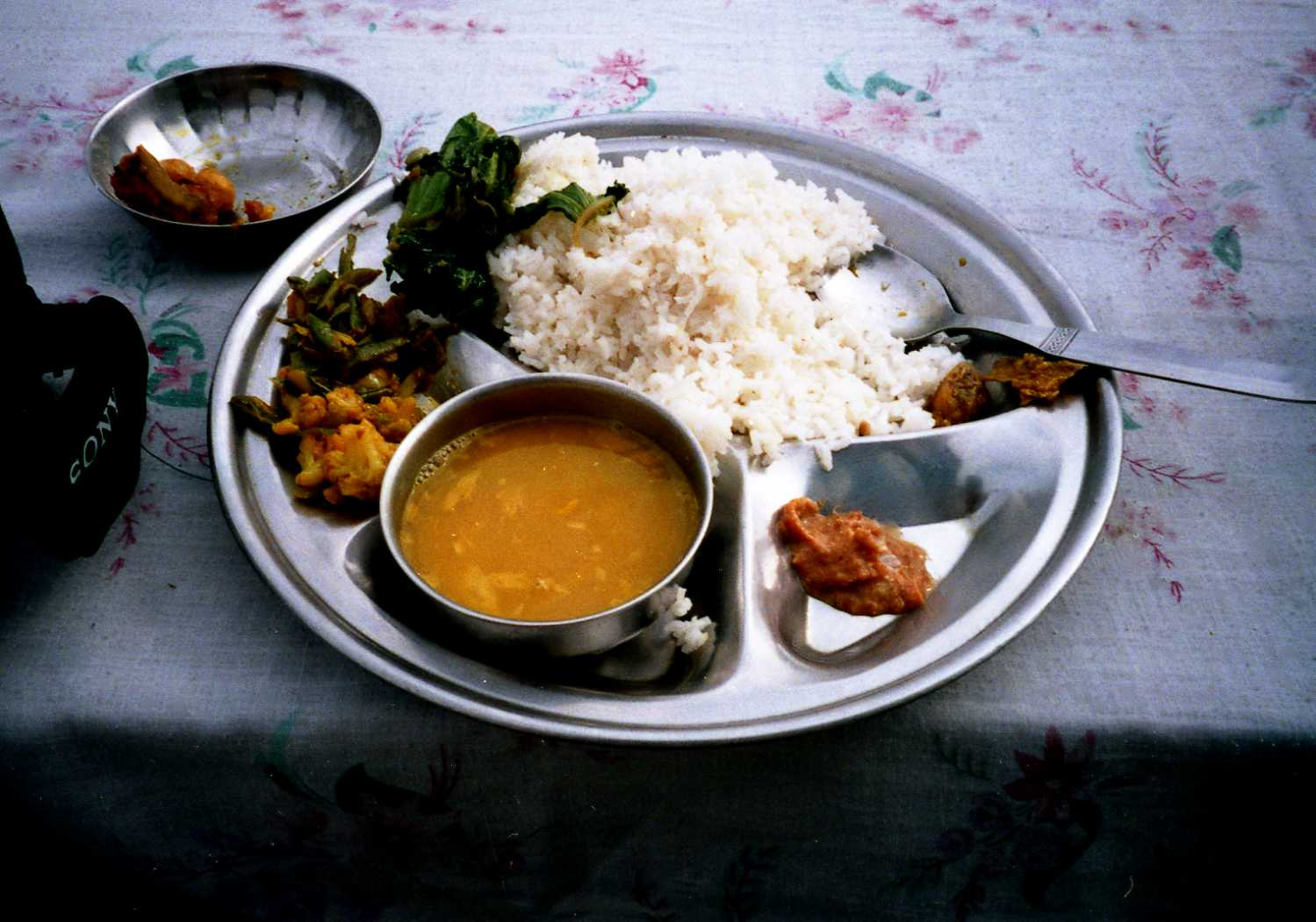 Dal Bath, plat traditionnelle népalais